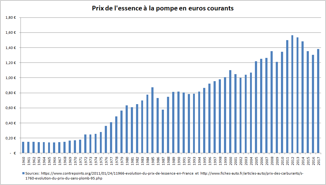 Prix de l'essence à la pompe en France en euros courants